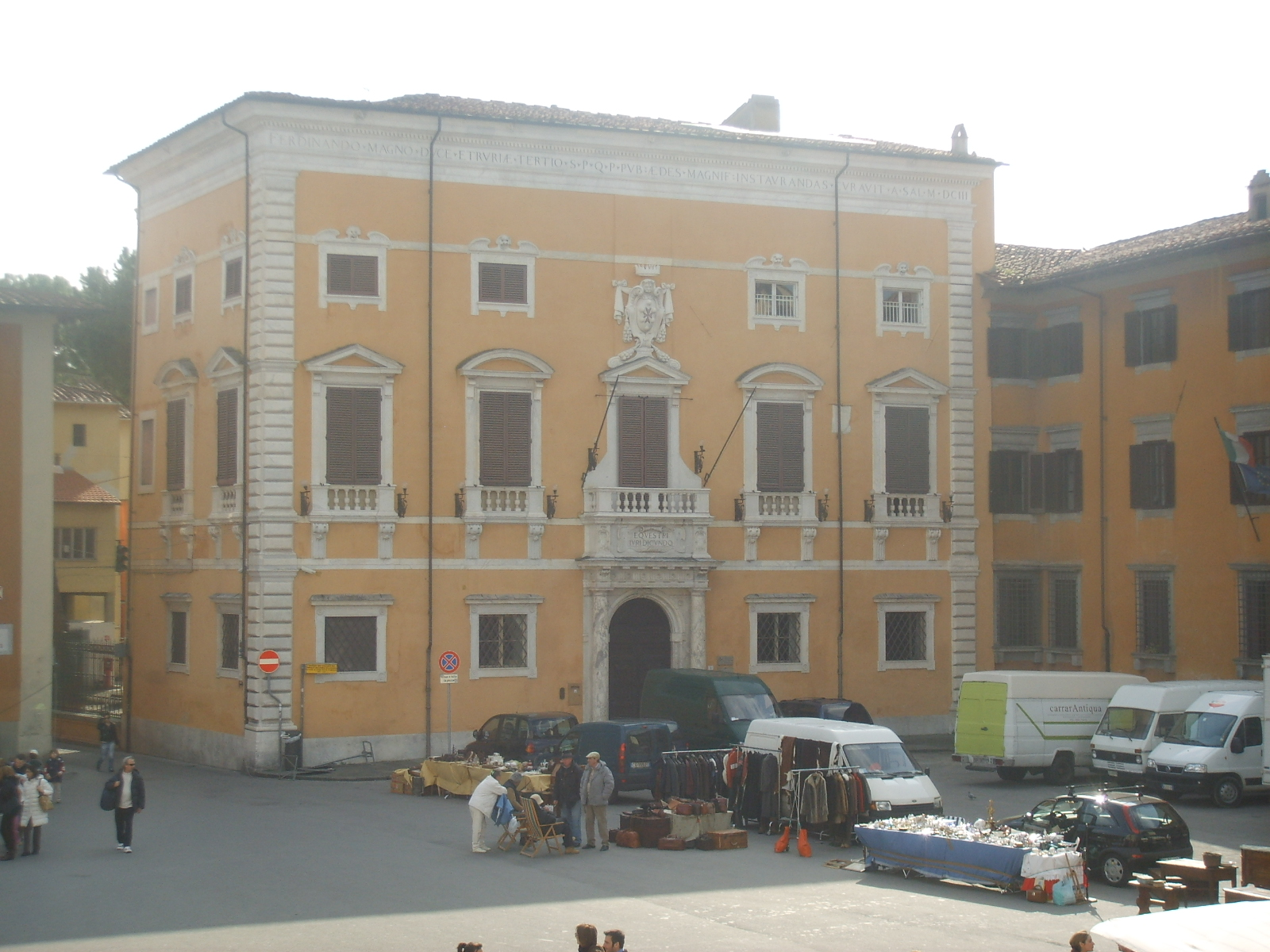 Palazzo_del_Consiglio_dei_Dodici